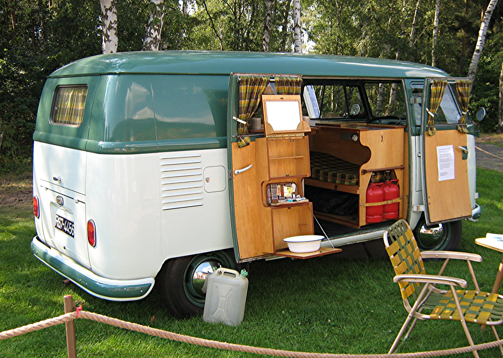 VW-Bus mit Westfalia Campingbox, einer leicht aus- und einbaubaren Zusatzeinrichtung für den VW T1-Transporter. Das Fahrzeug gehört dem Westfalia-Museum und wurde bei den Jubiläumsfeiern des Rheinischen Freilichtmuseums in Kommern gezeigt.